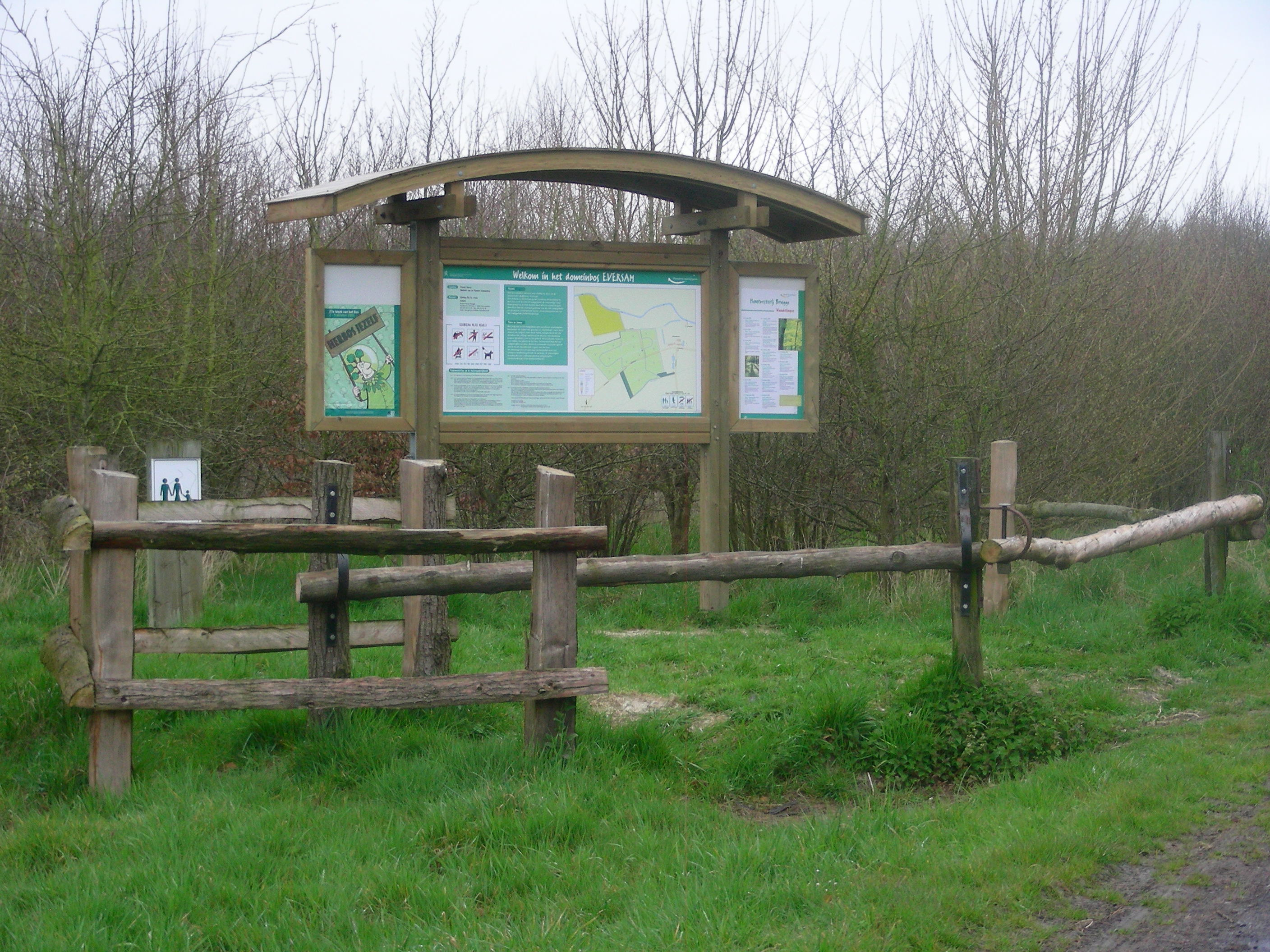 Foto zelf genomen van nieuw aangelegd Bos met de naam Eversambos te Stavele